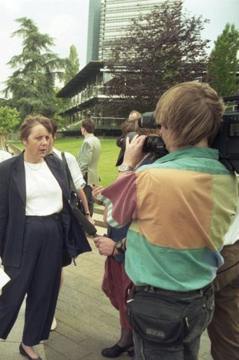 Die Bundesumweltministerin Angela Merkel am Stresemannufer hinter dem Plenarsaal der ehemaligen Bundeshauptstadt Bonn beantwortet einem Fernsehteam deren Fragen. Im Hintergrund ist das Abgeordnetenhochhaus Langer Eugen zu sehen. Fotografische Impressionen von Andreas Bohnenstengel während der Parlamentarischen Woche im Juni 1995 in: Der Dreizehnte Deutsche Bundestag. Innenansichten unseres Parlaments. ISBN 3-87576-357-2